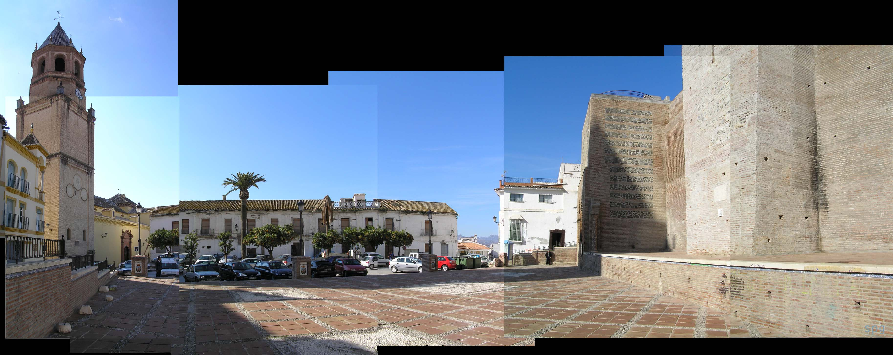 Vista Panorámica Plaza de la Constitución en Vélez Málaga, por Santiago Pardo García